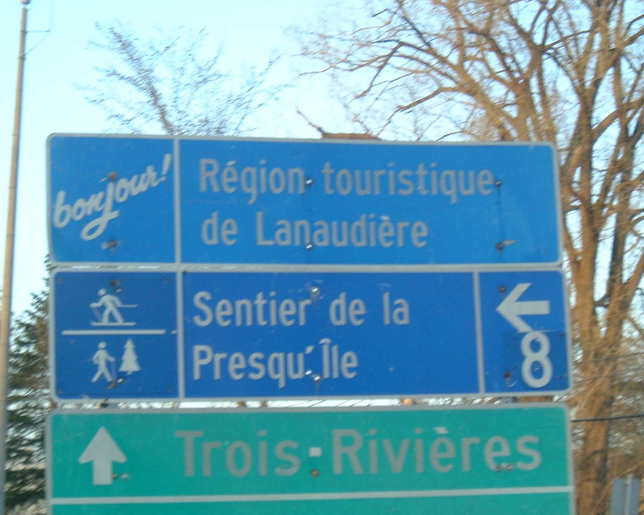 Bonjour Lanaudière sign photographed in Repentigny, Quebec, Canada.